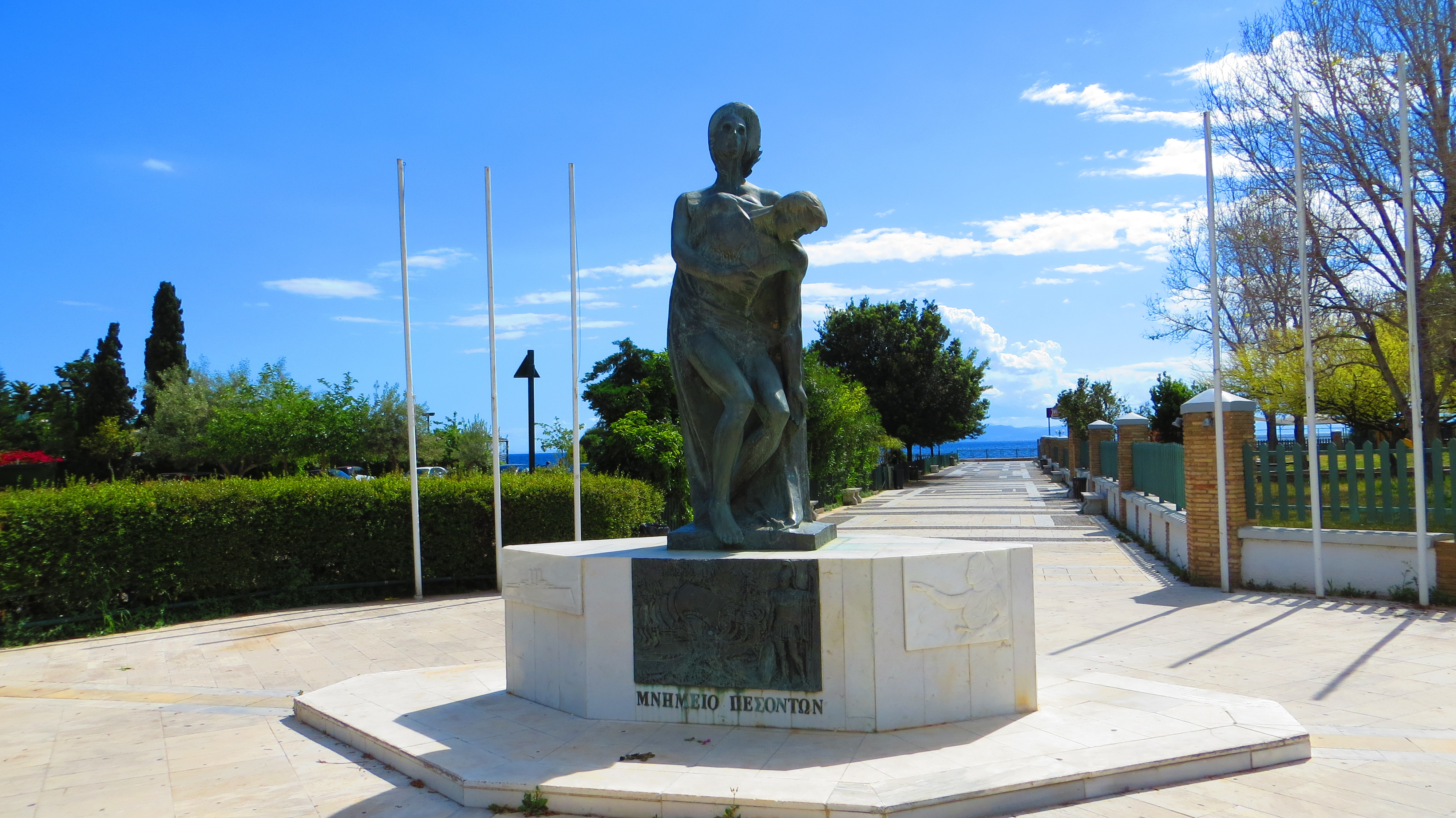 Alimos